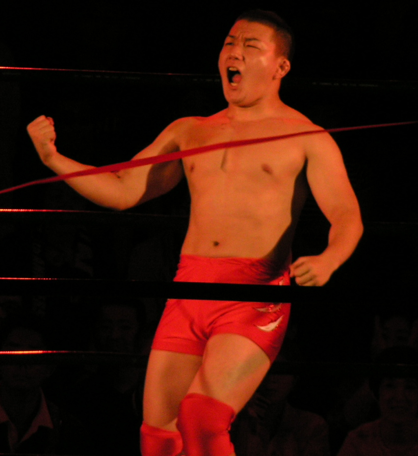 レンブラントが撮影。